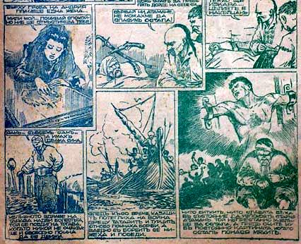 «Тарас Бульба» Н. В. Гоголя. Комикс сербского художника Николая Навоева (перепечатка на болгарском языке)